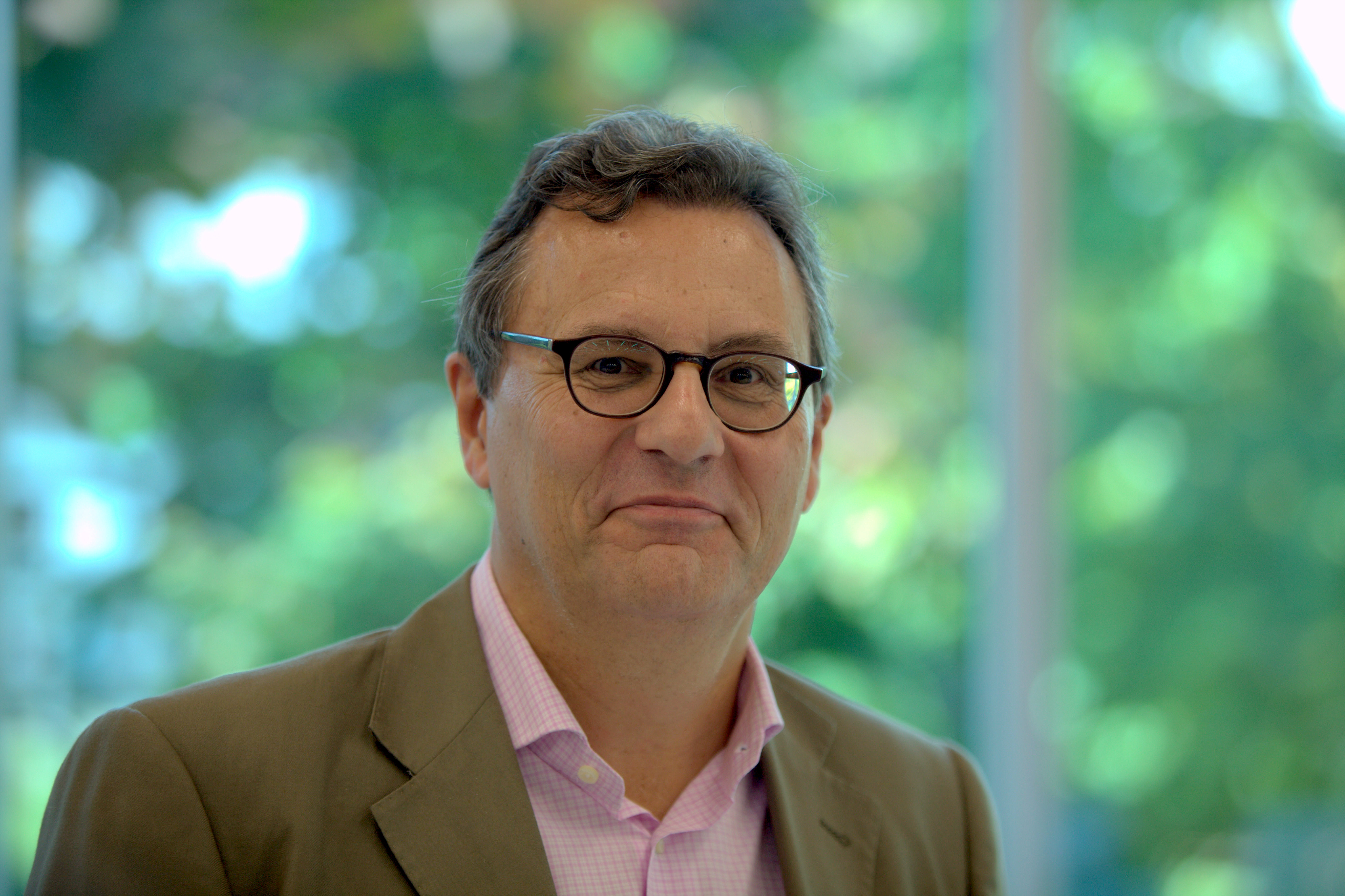 Hans-Joachim-Otto, Staatssekretär im Bundesministerium für Wirtschaft und Technologie